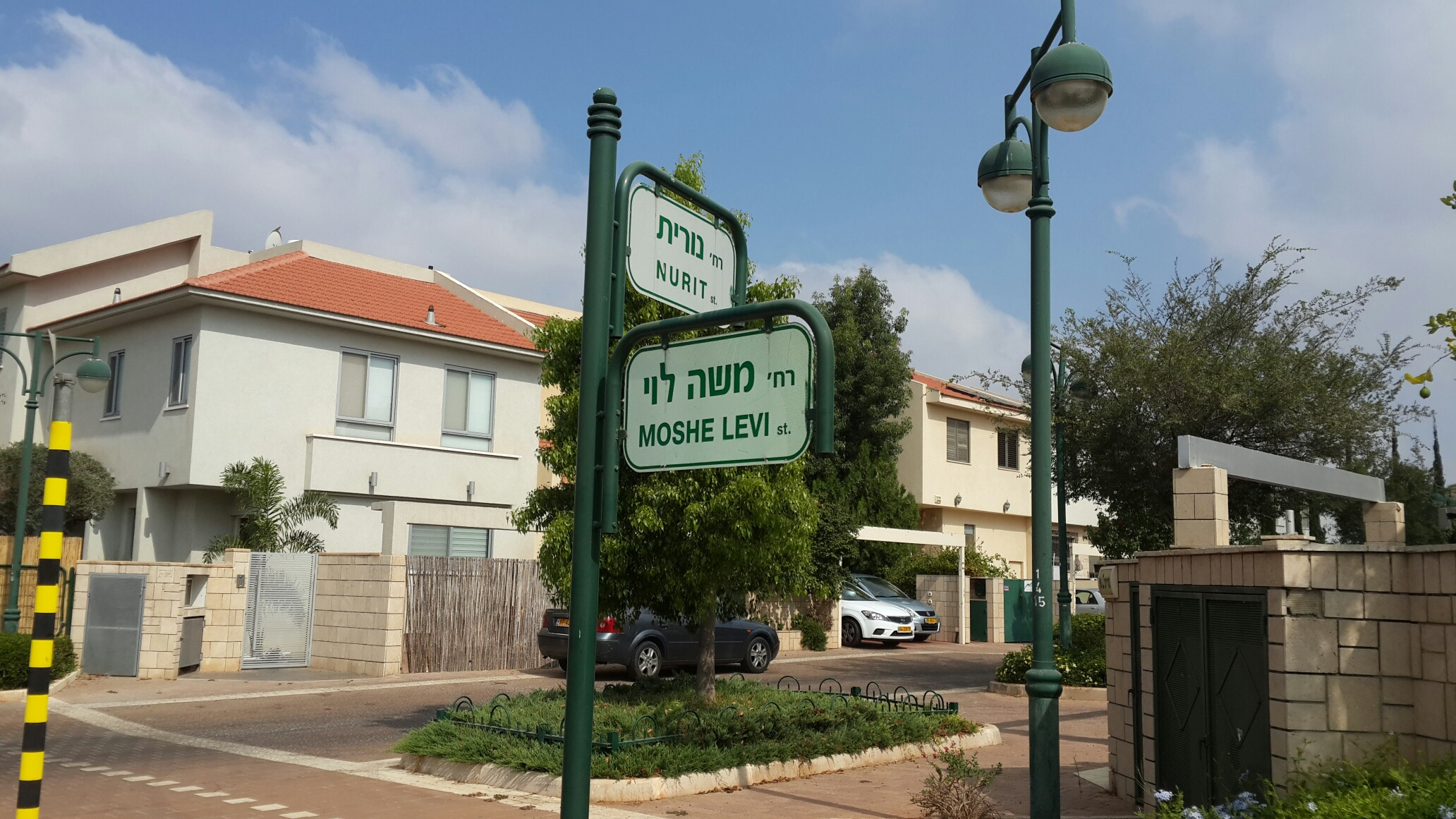 רחוב משה לוי נס ציונה שלט רחוב